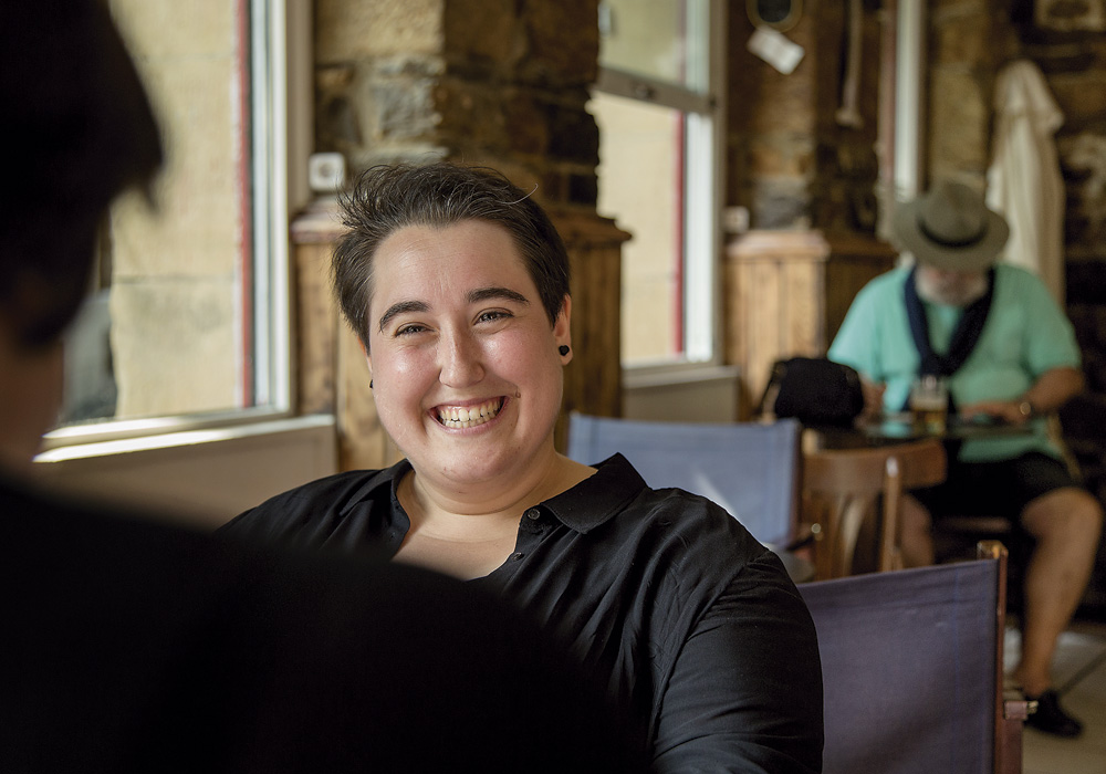 Nerea Arriola Urberuaga (1988, Donostia). Erizaina da lanbidez, baina antzerkian ibili da betidanik, Zurriolako Ikastolako antzerki-taldean. Berak eman die gorputza eta ahotsa 'Supertxope' euskal youtuberrari eta Info7 irratiko 'Dolores Mujika Dolox' pertsonaiari. 2016. urtean egin zuen lehen bakarrizketa, Donostiako Arte Eszenikoen Tailerrean ibili zen prestakuntza lanetan.